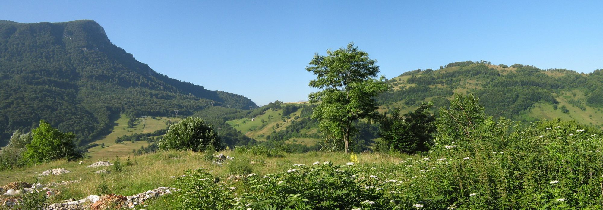 Ulaz u Hercegovačko Neretvanski kantnon Gate of Herzegowina Neretva Canton.